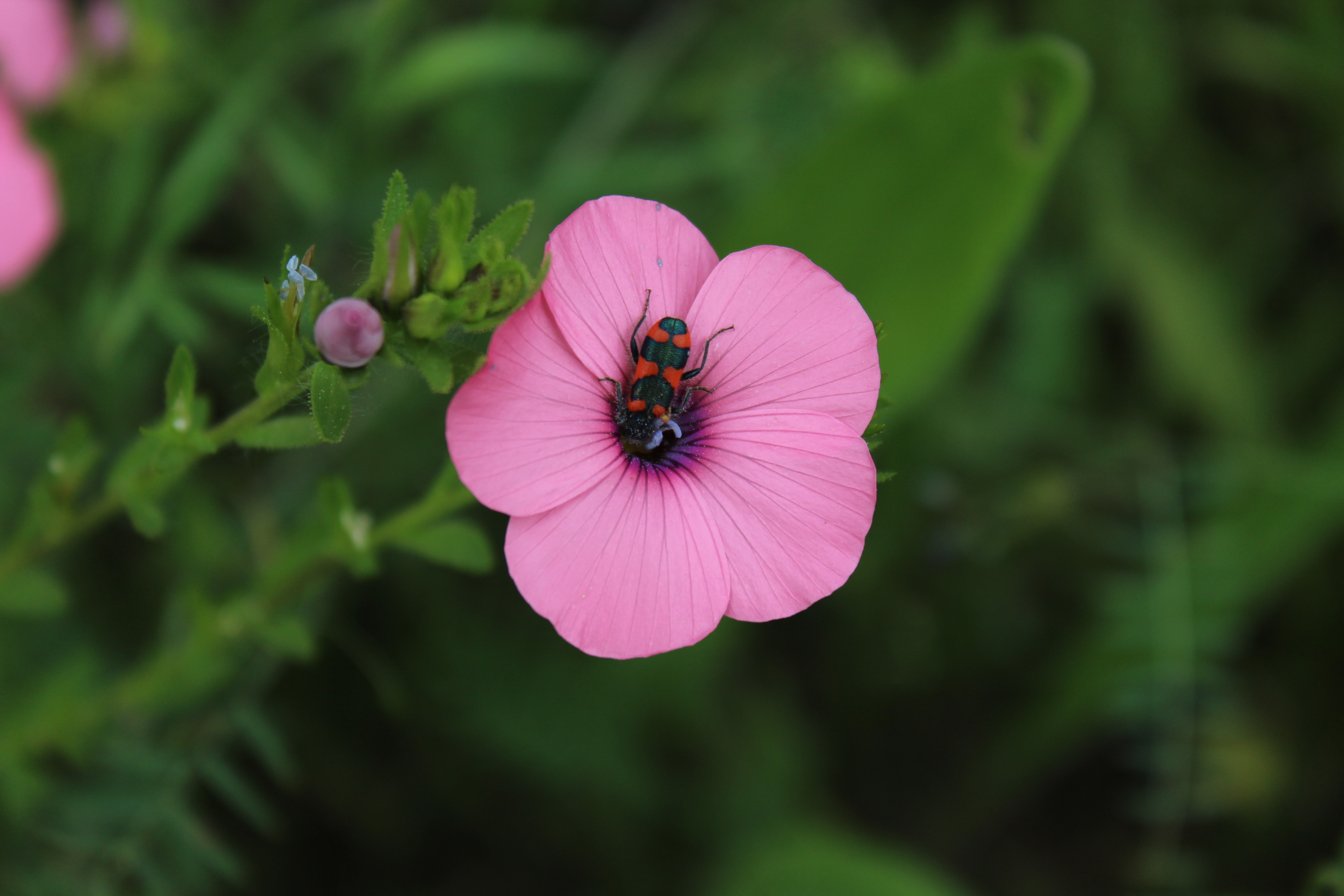 חרק על הפשתה השעירה